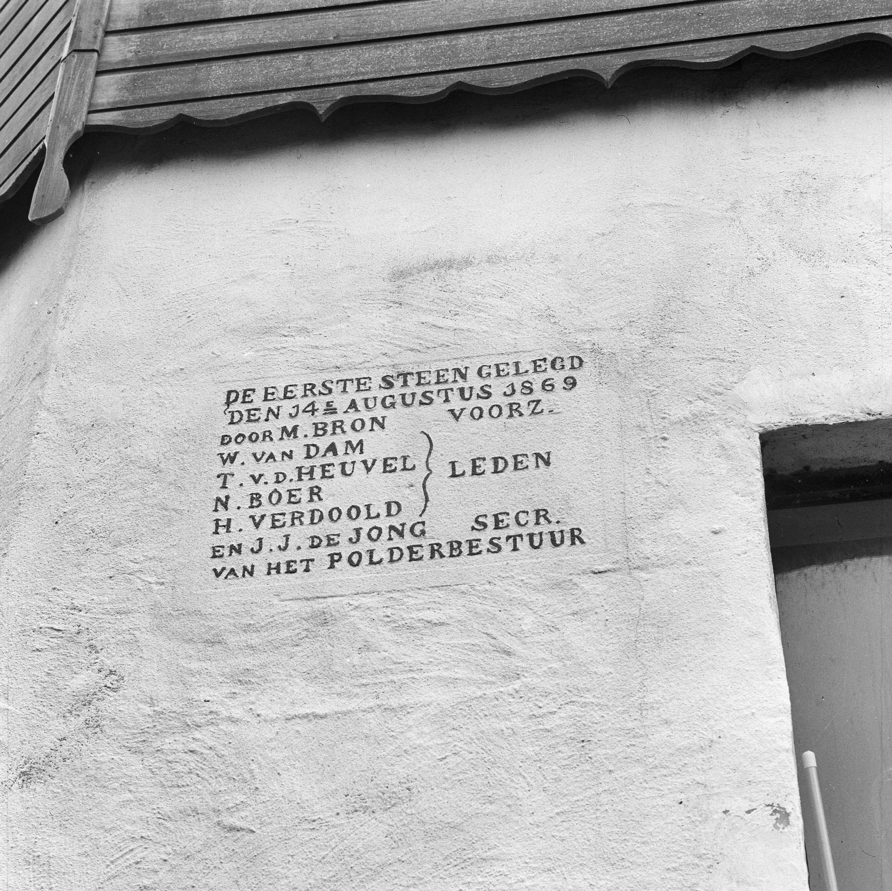 VOORMALIGE MOLEN (POLDER MIDDELBLOK): Exterieur STICHTINGSSTEEN (DE EERSTE STEEN GELEGD DEN 14E AUGUSTUS 1869) OP DE MOLENROMP